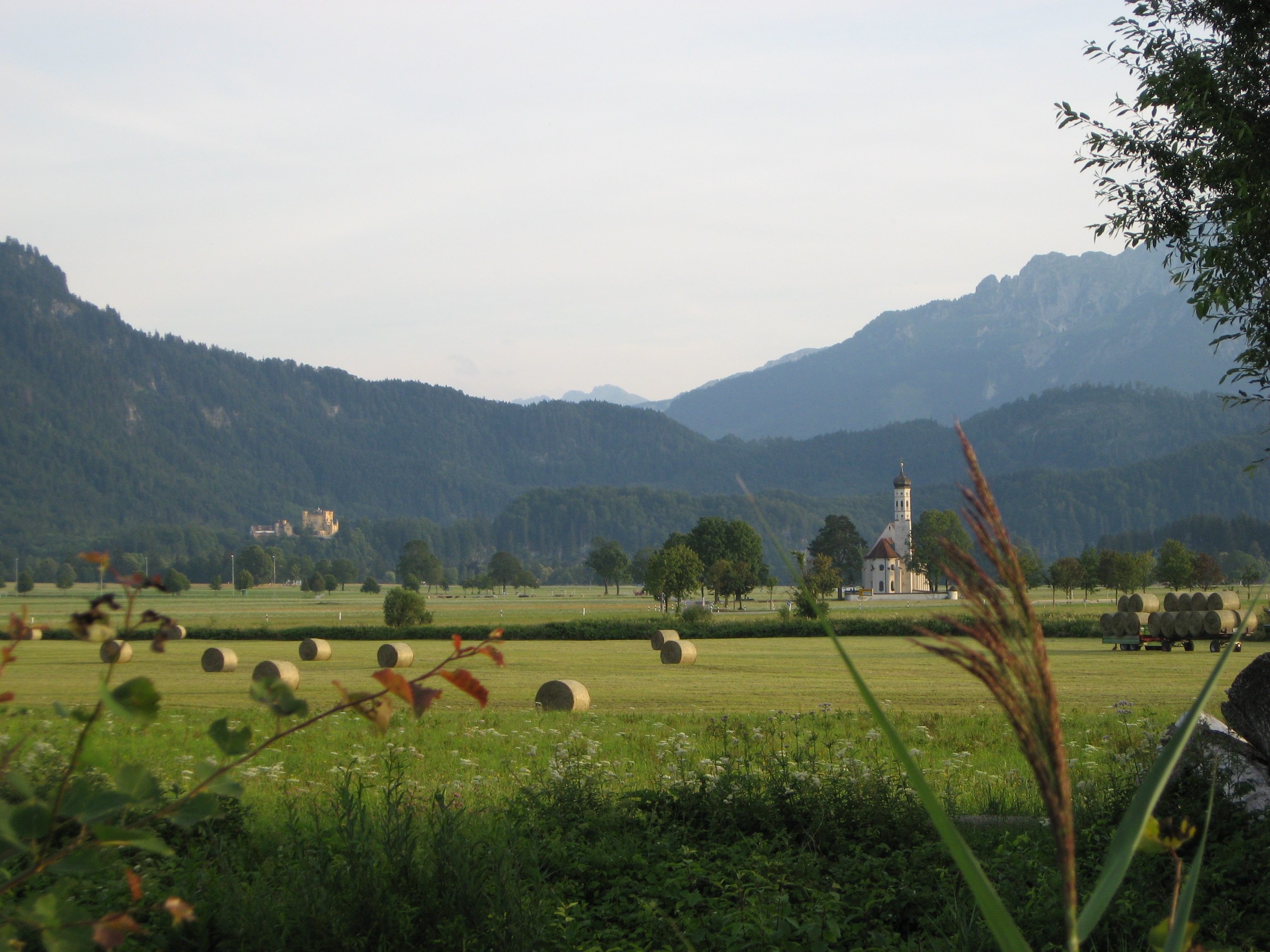 Het Ostallgäuerlandschap bij Schwangau.